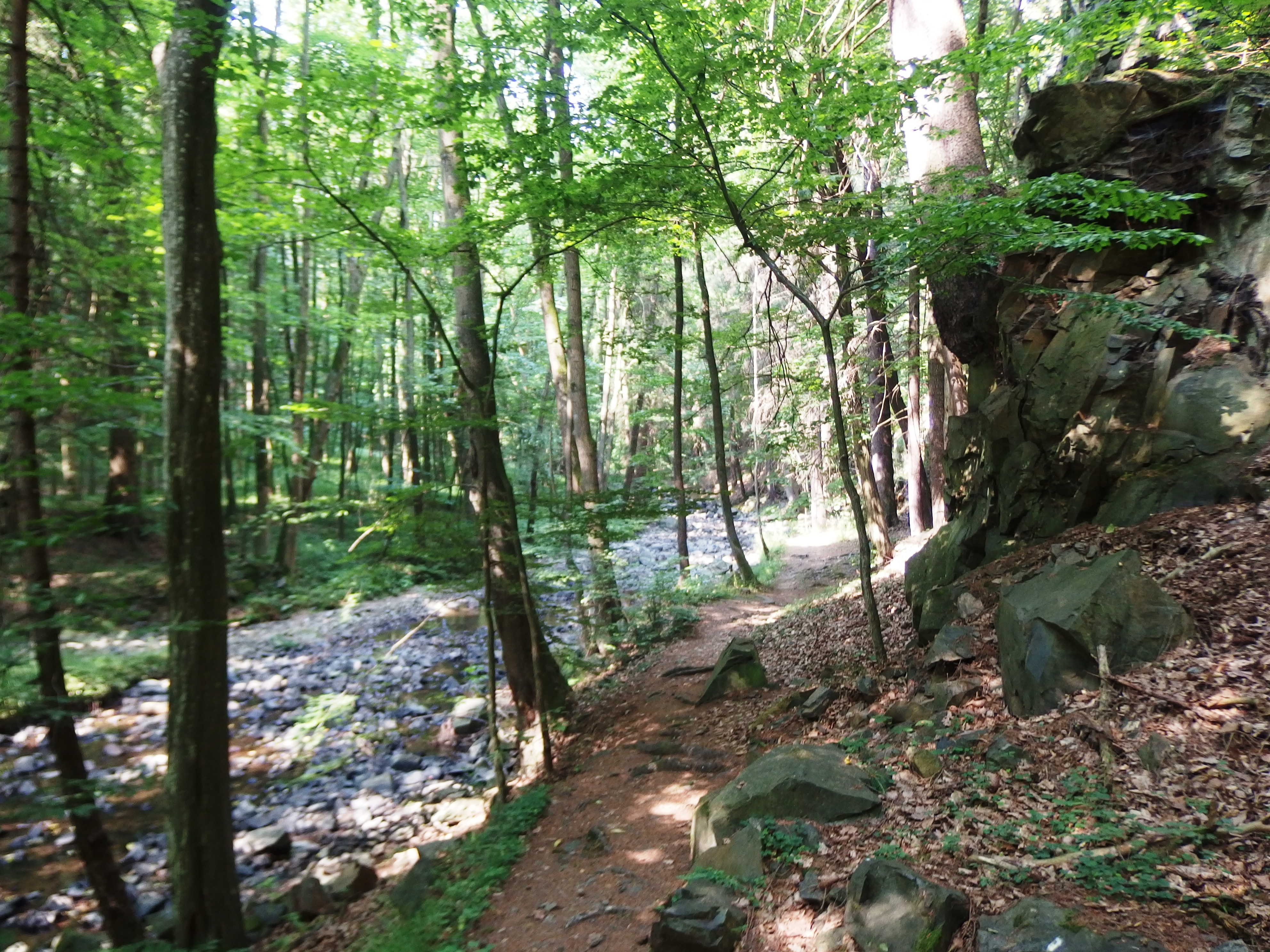 Šilinkův důl, kaňonovité údolí říčky Krounky mezi Kutřínem a Předhradím, okres Chrudim.